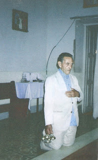 Foto do Sr. Armindo Cesário Vieira(Pessoa ilustre dentro da história da Paróquia de Santa Rita)